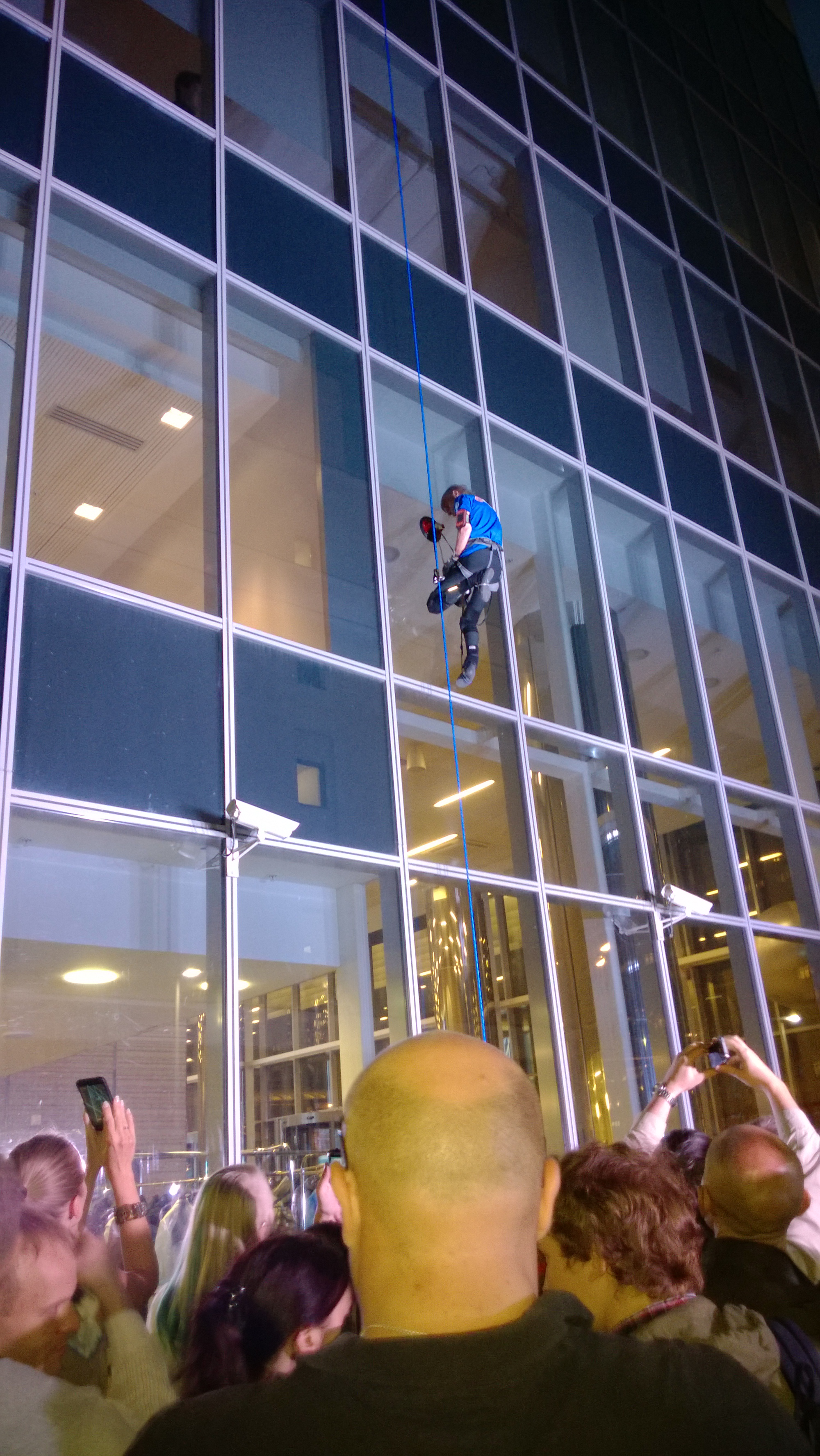 Ален Робер покоряет офис Mail.Ru Group